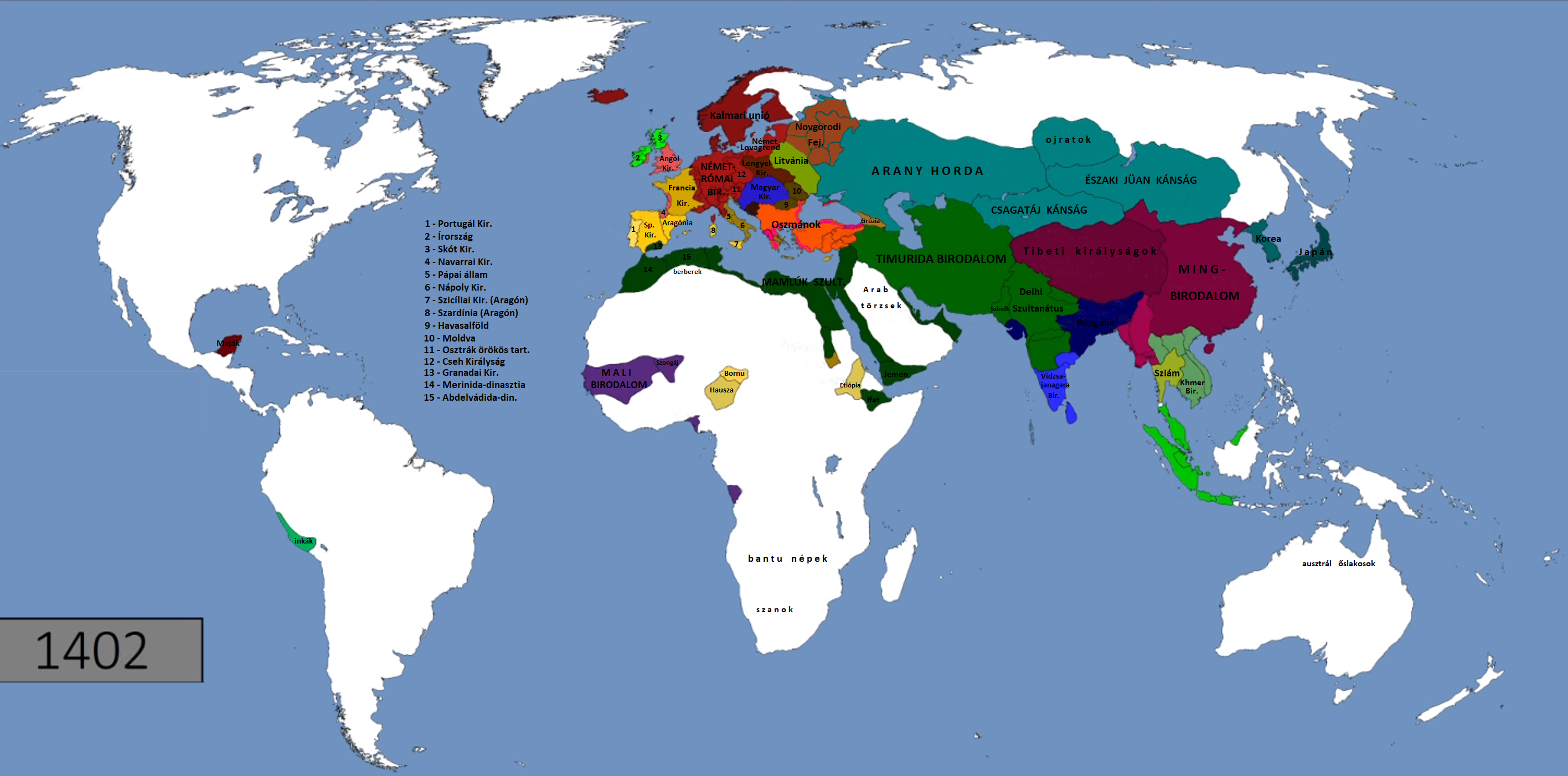 Az ismert világ 1402-ben